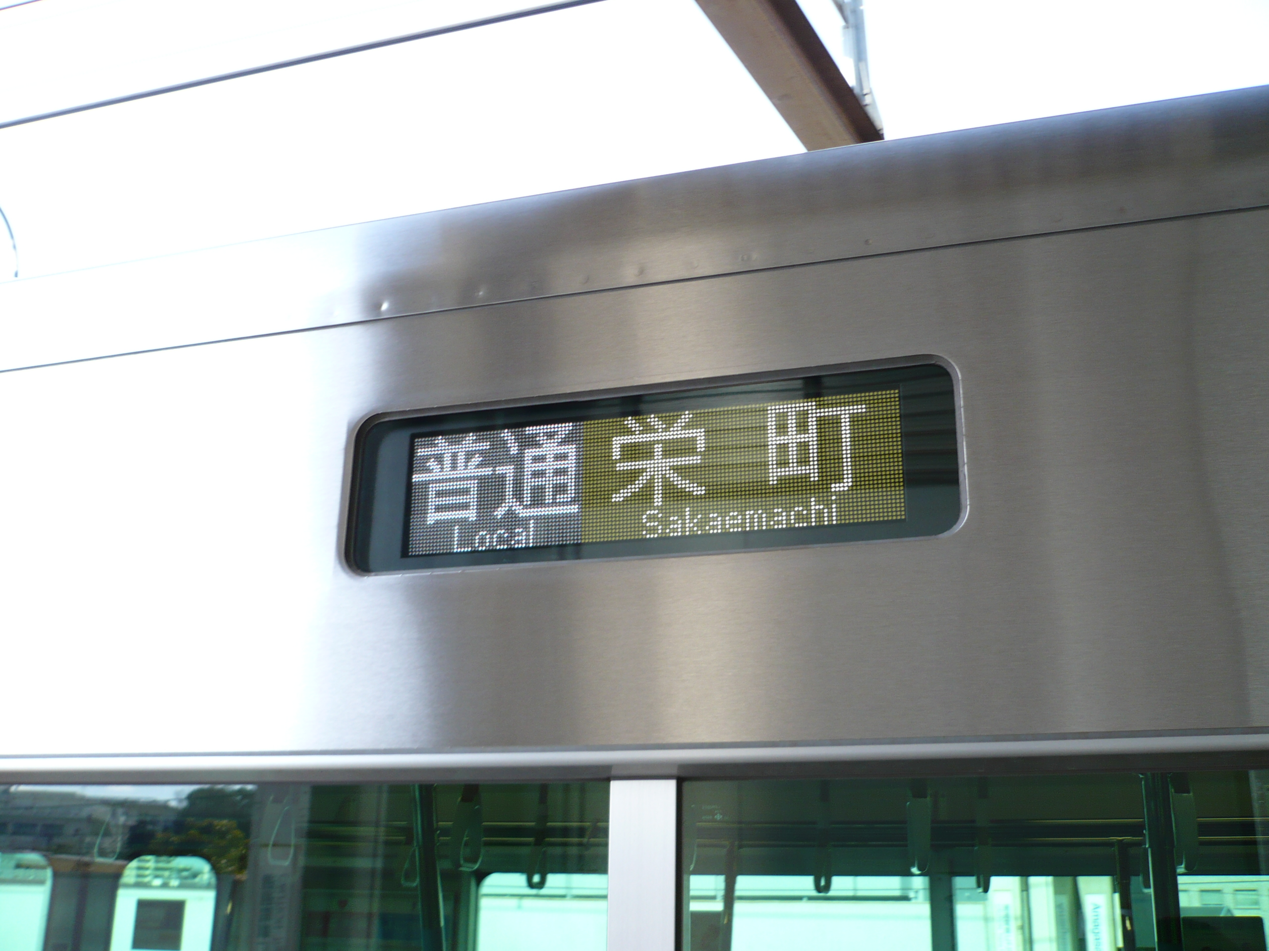 名鉄4000系LED方向幕